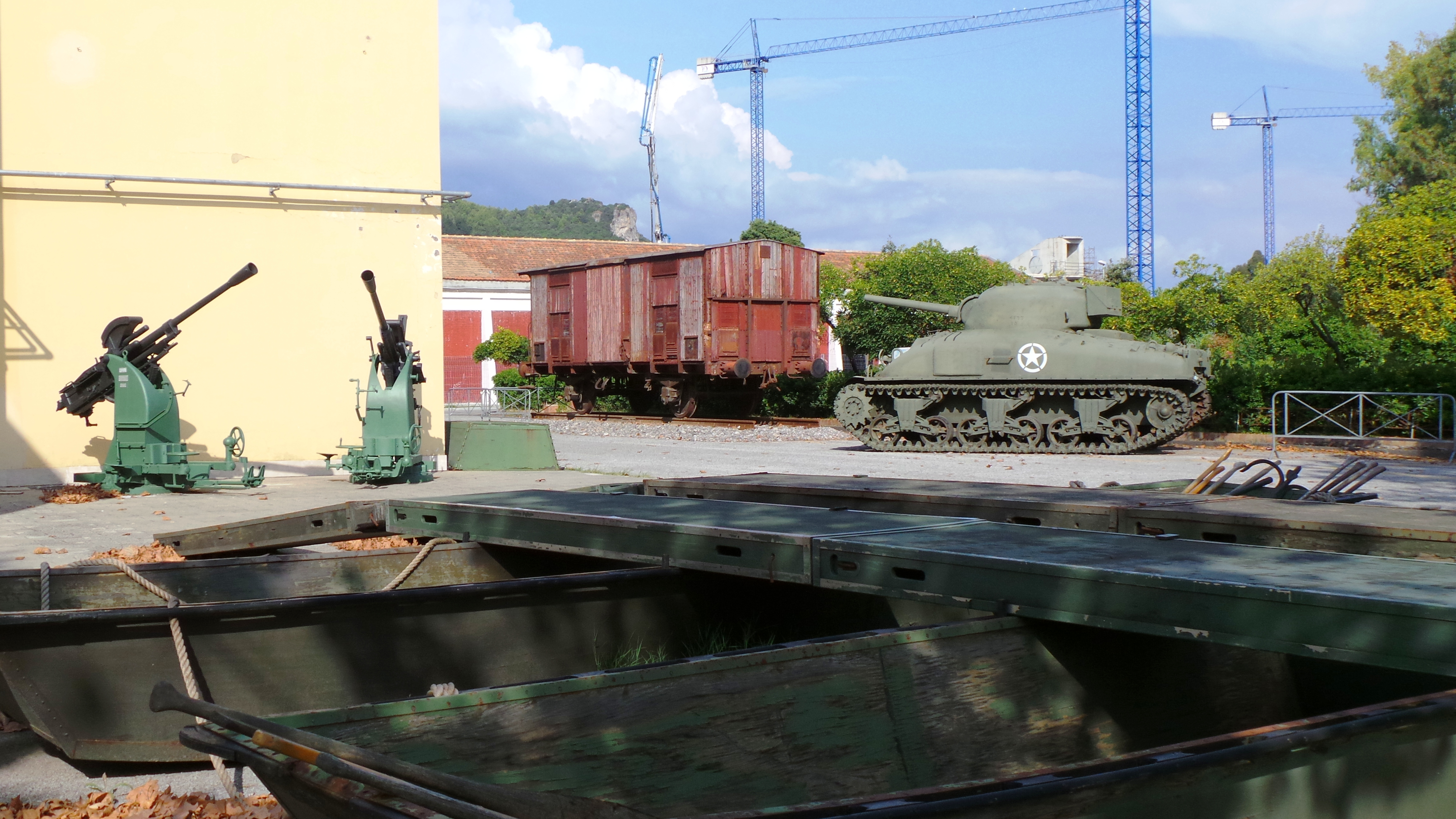 Museo dello Sbarco e Salerno Capitale